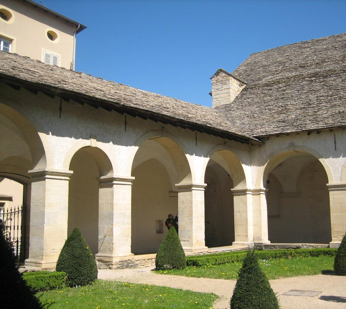 Couvent des Augustins, 14ème siècle, Crémieu